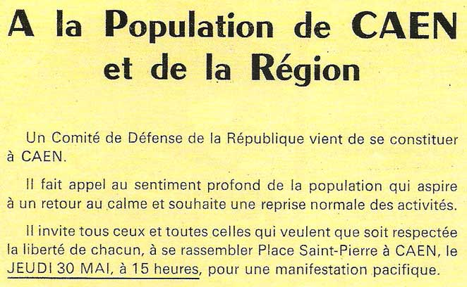 tract du CDR du Calvados du 30 mai 1968